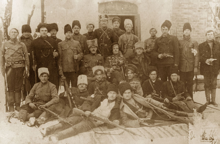 Дибривский отряд Ф. Щуся. Ф. Щусь(?-1921) сидит в центре